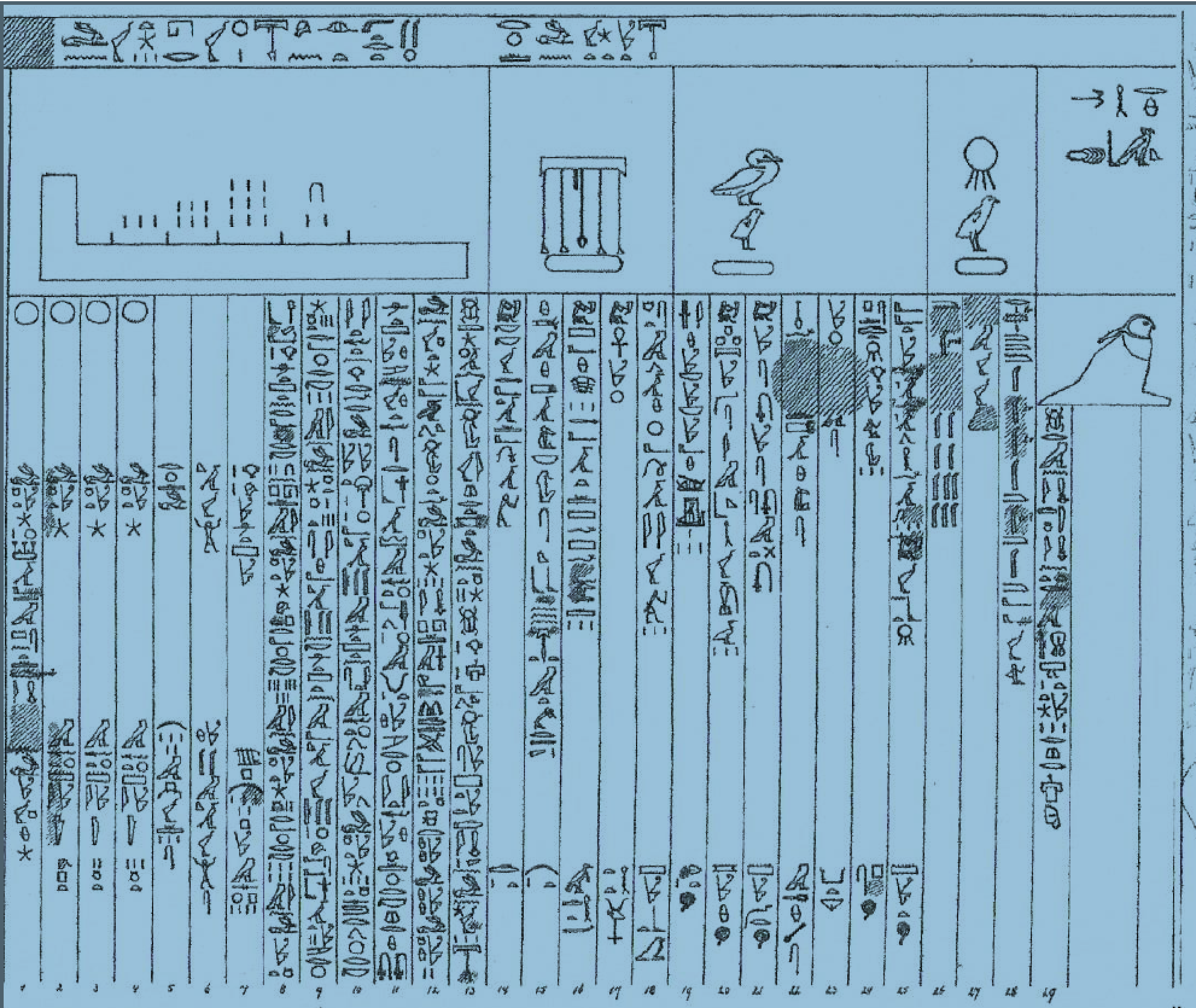 Texte épigraphique concernant une règle en L dans une inscription du cénotaphe de Séthi I à Abydos.